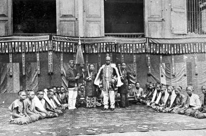 Repronegatief. Sultan Aji Muhammad Sulaiman van Kutai met zijn gevolg voor het oude paleis.